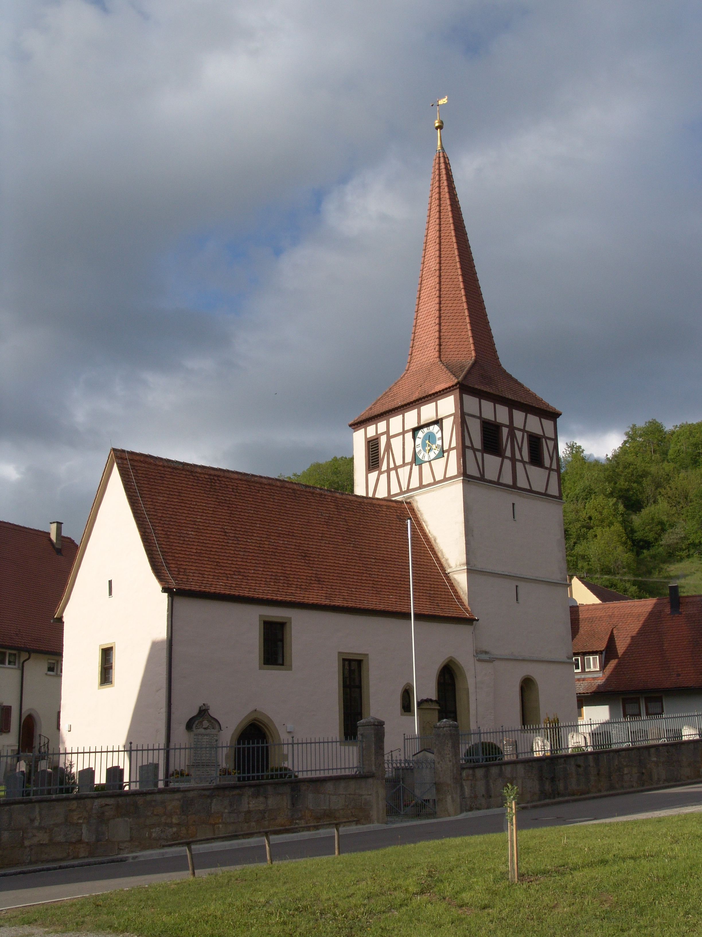 evang.-luth Kirche St. Georg in Bettwar